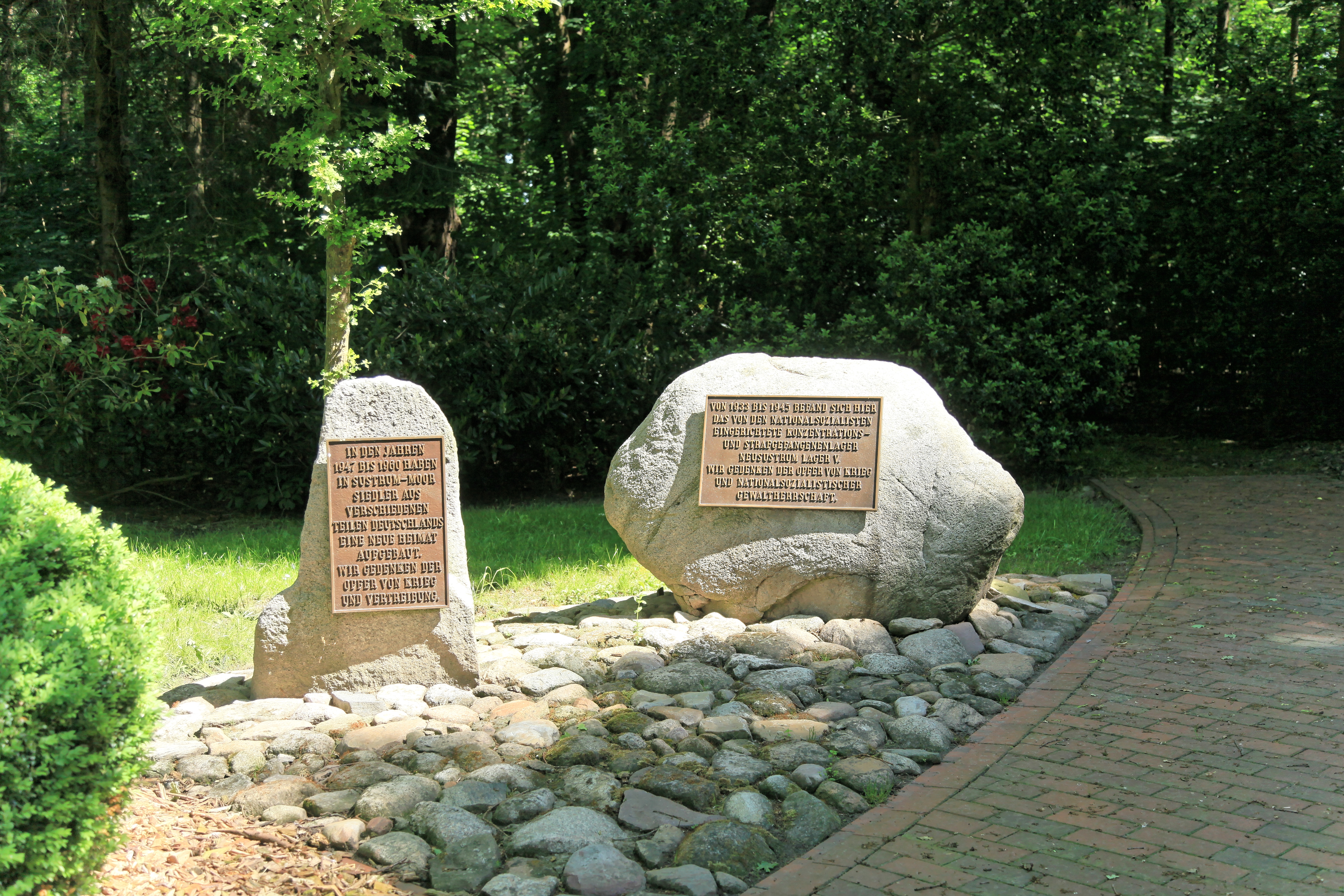 Gedenkstätte an und im Park des ehemaligen KZ Neusustrum (Lager V der Emslandlager), Teichstraße in Sustrum-Moor, Sustrum